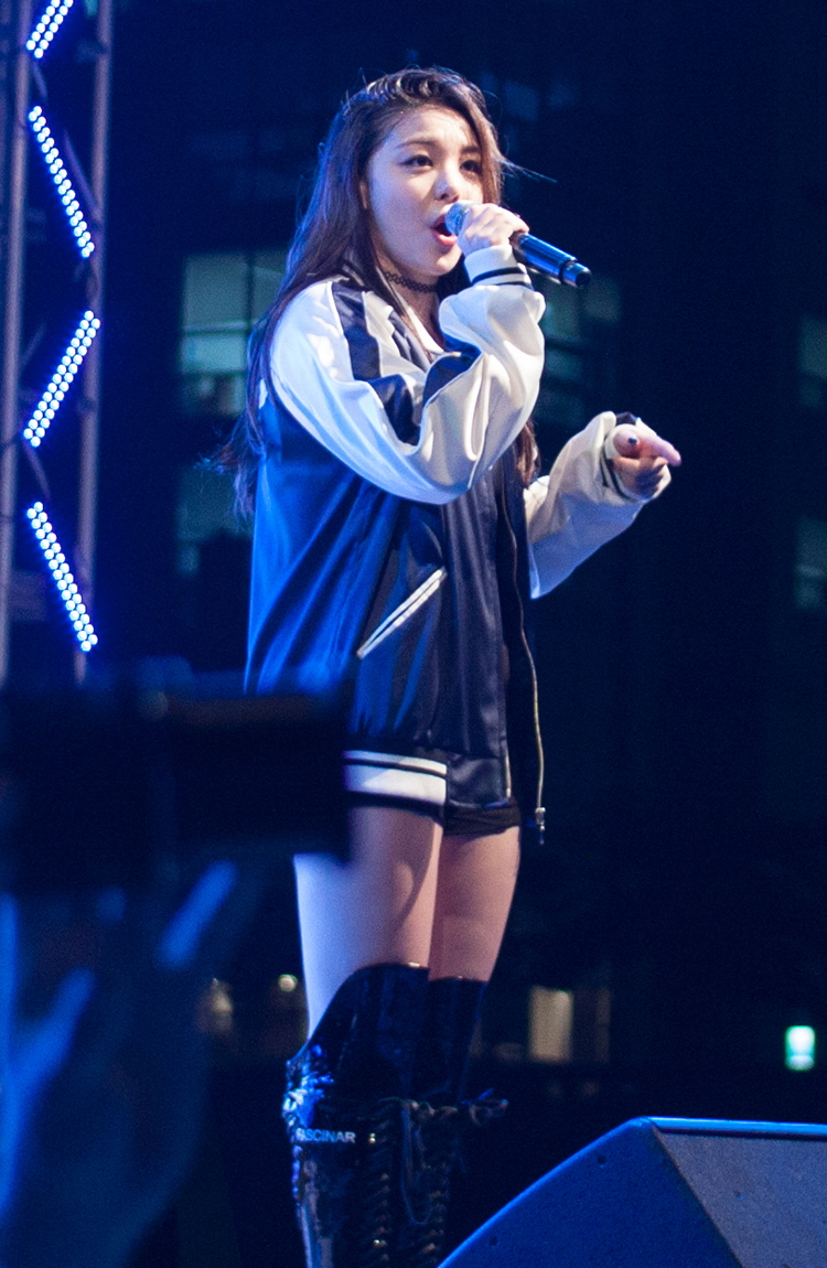 160524 경희대학교 카스콘서트 _ 에일리 직찍